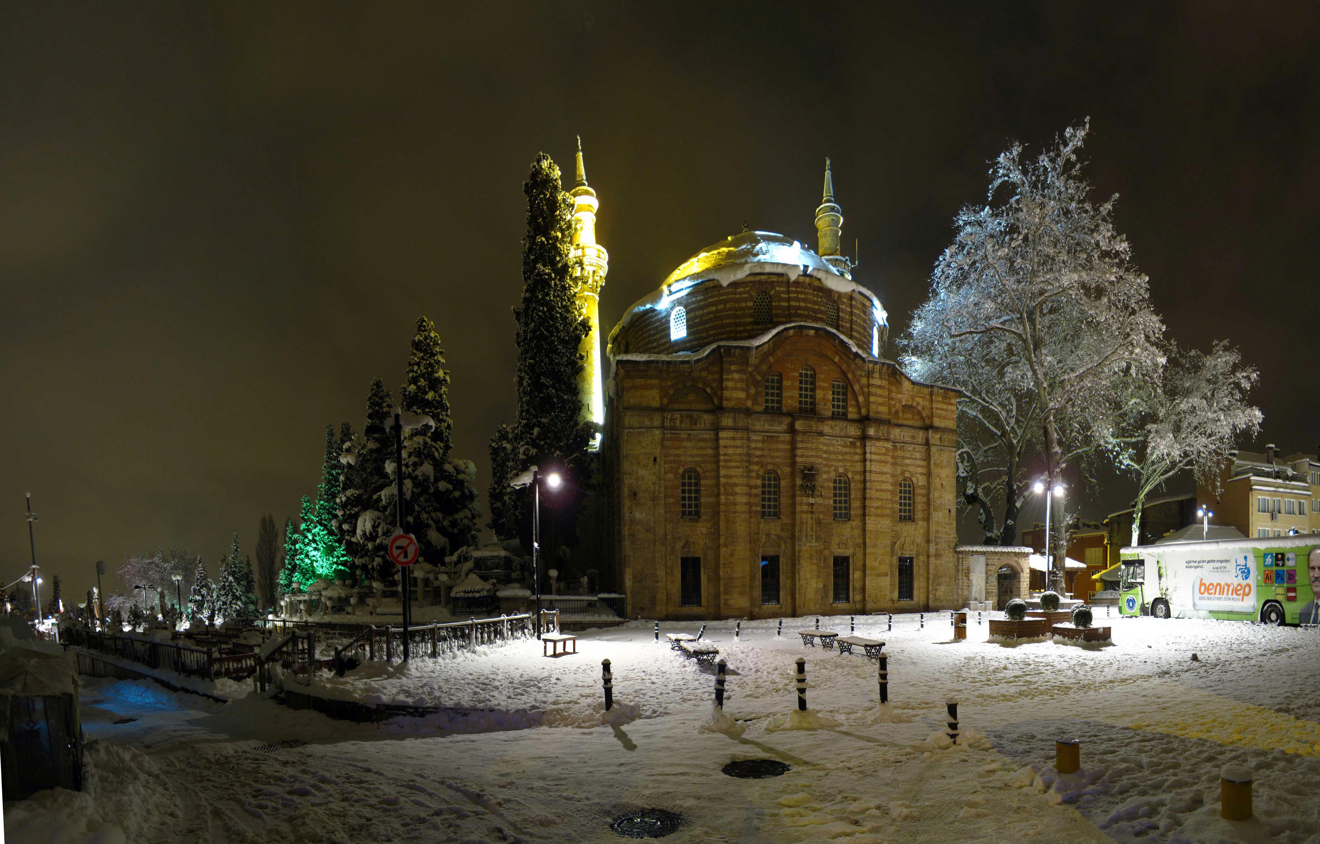 EmirSultan Cami Bursa